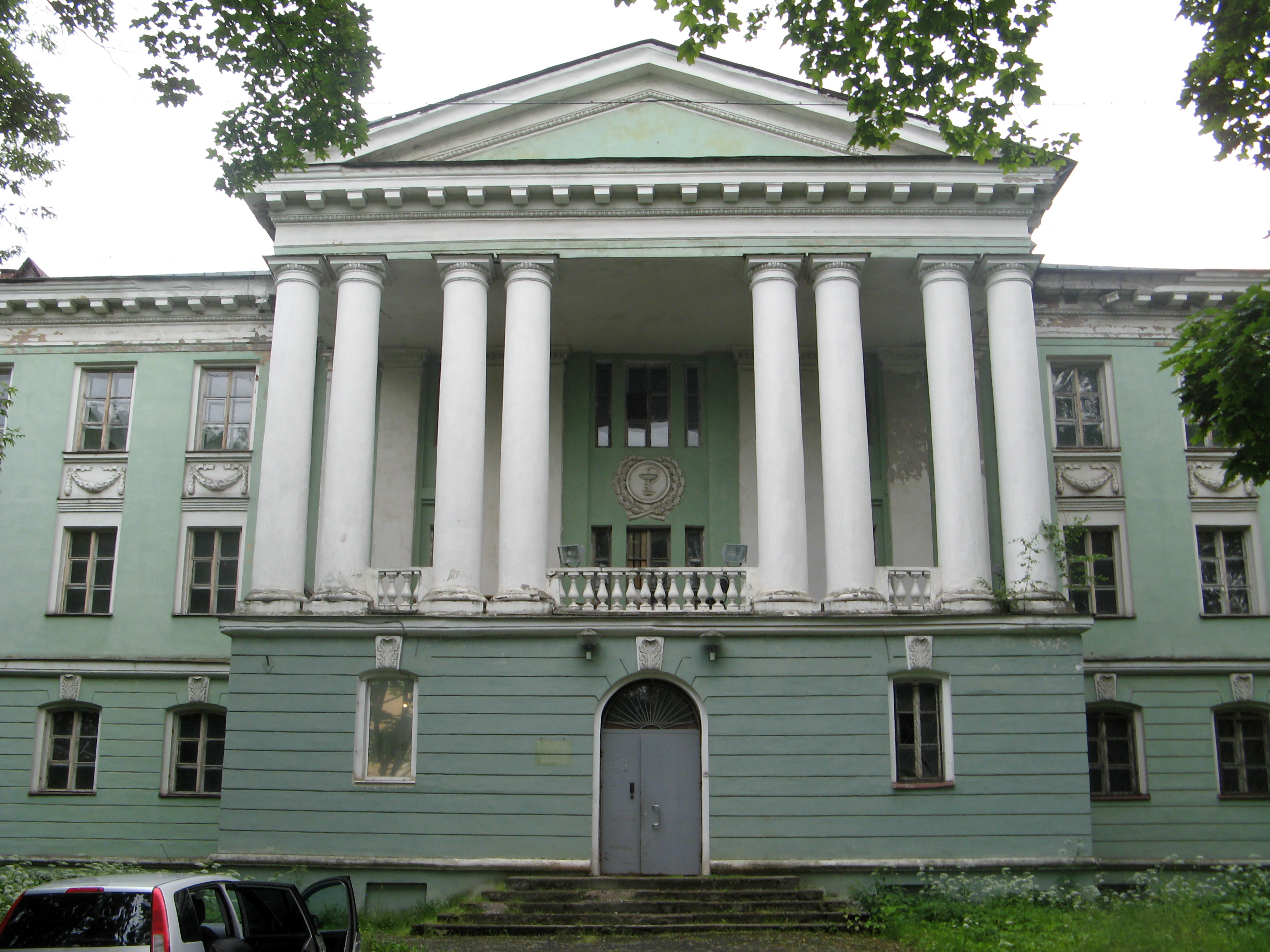 Здание медсанчасти № 1 завода им. М.И. Калинина: улица Одоевского, 10, Василеостровский район, Санкт-Петербург